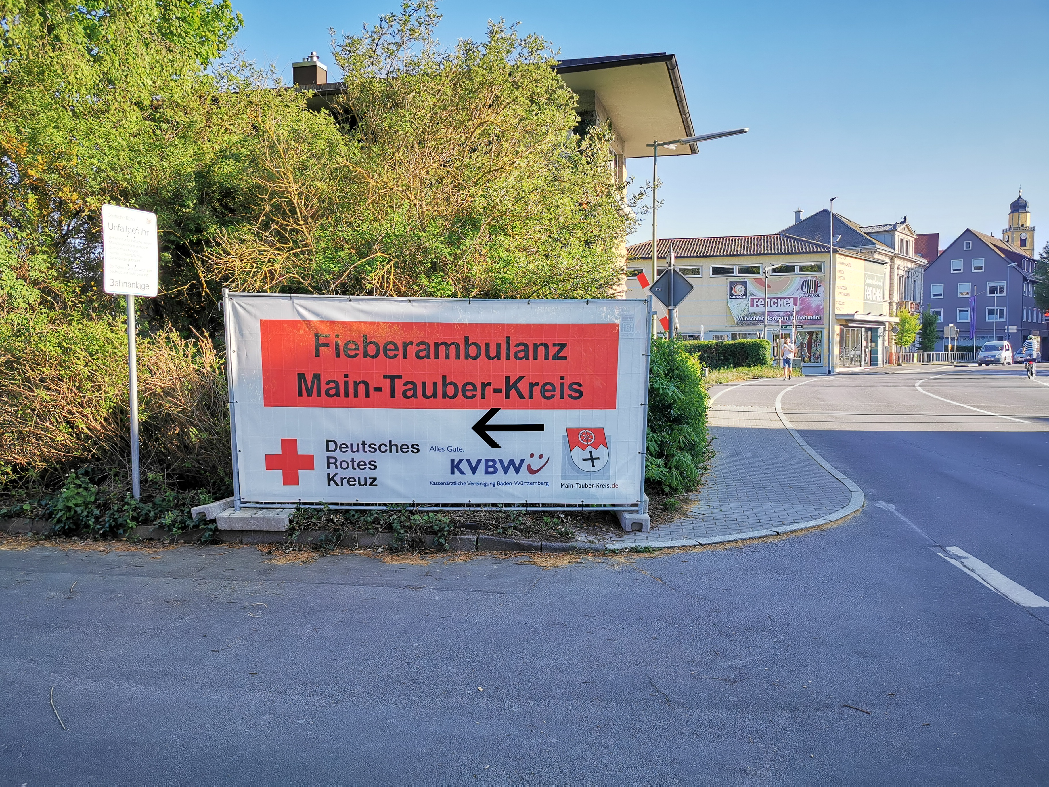 Fieberambulanz Bad Mergentheim in einer ehemaligen Tagesklinik in Bahnhofsnähe während der COVID-19-Pandemie im Main-Tauber-Kreis